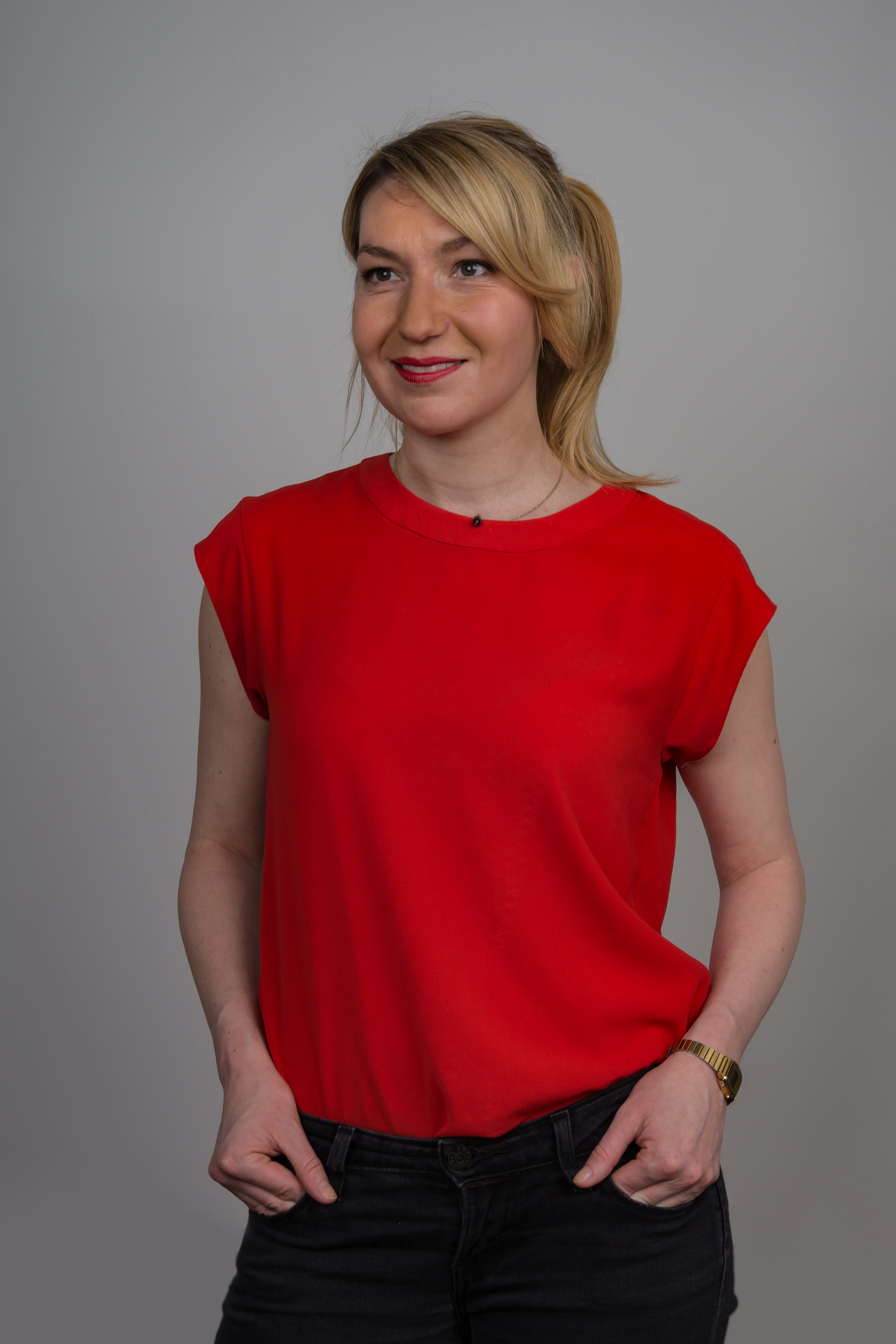 Fotoprojekt Österreichischer Film 2016:Schauspielerin Julia Jelinek